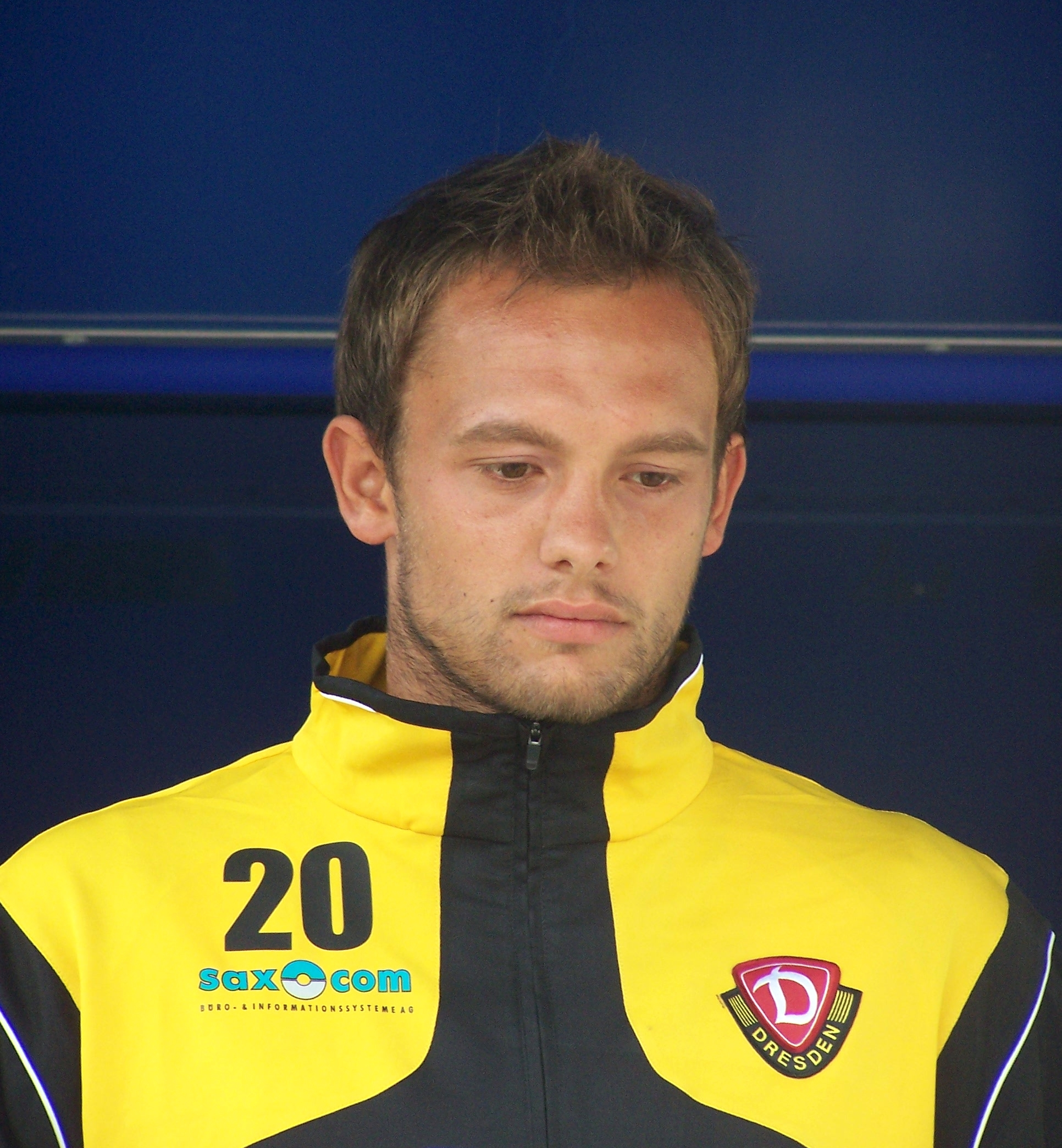 Marcus Hesse bei der Teampräsentation von Dynamo Dresden zum Start der Drittliga-Saison 2008/09